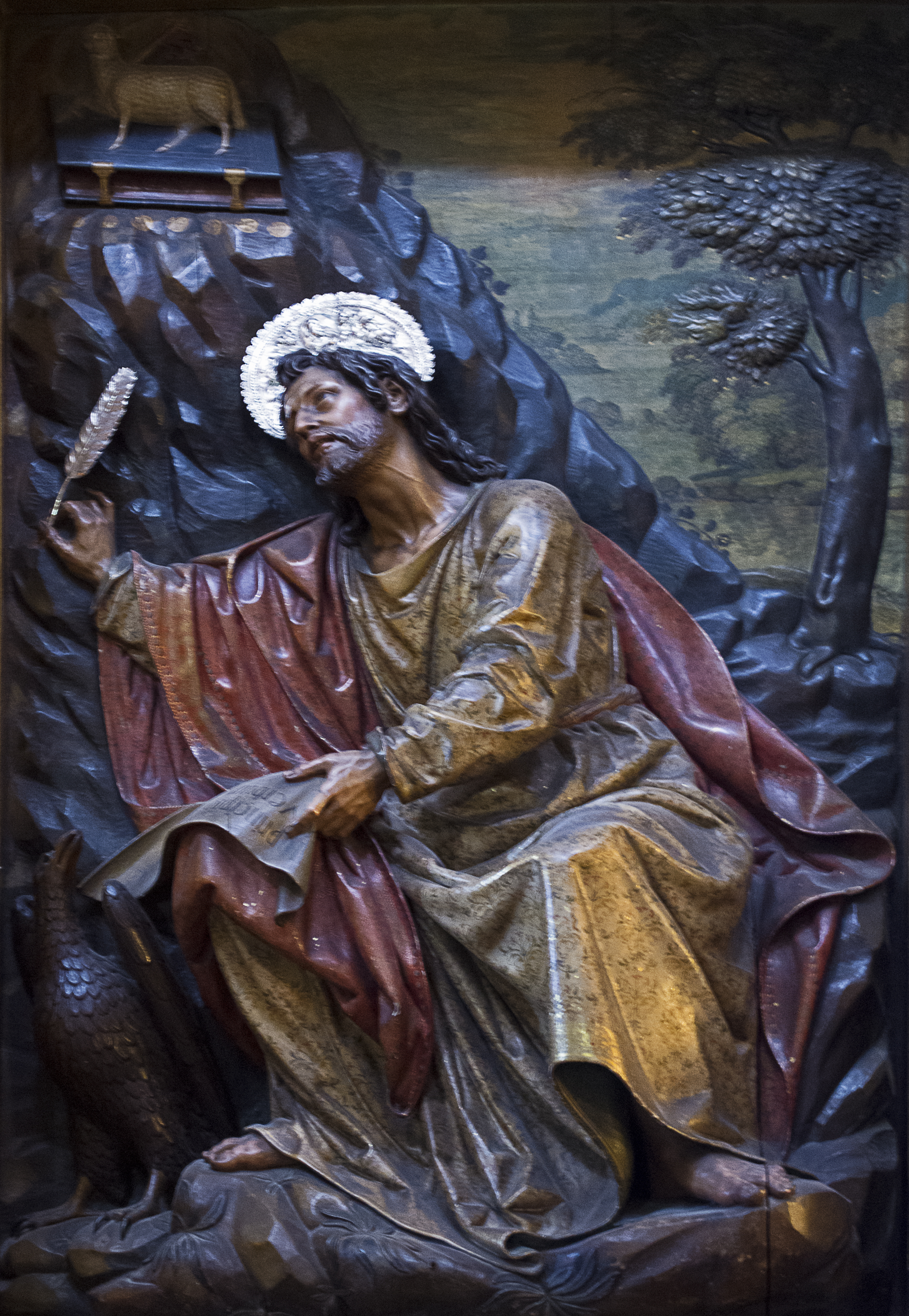 San Juan evangelista, convento San Leandro (Sevilla), obra de Juan Martínez Montañés.